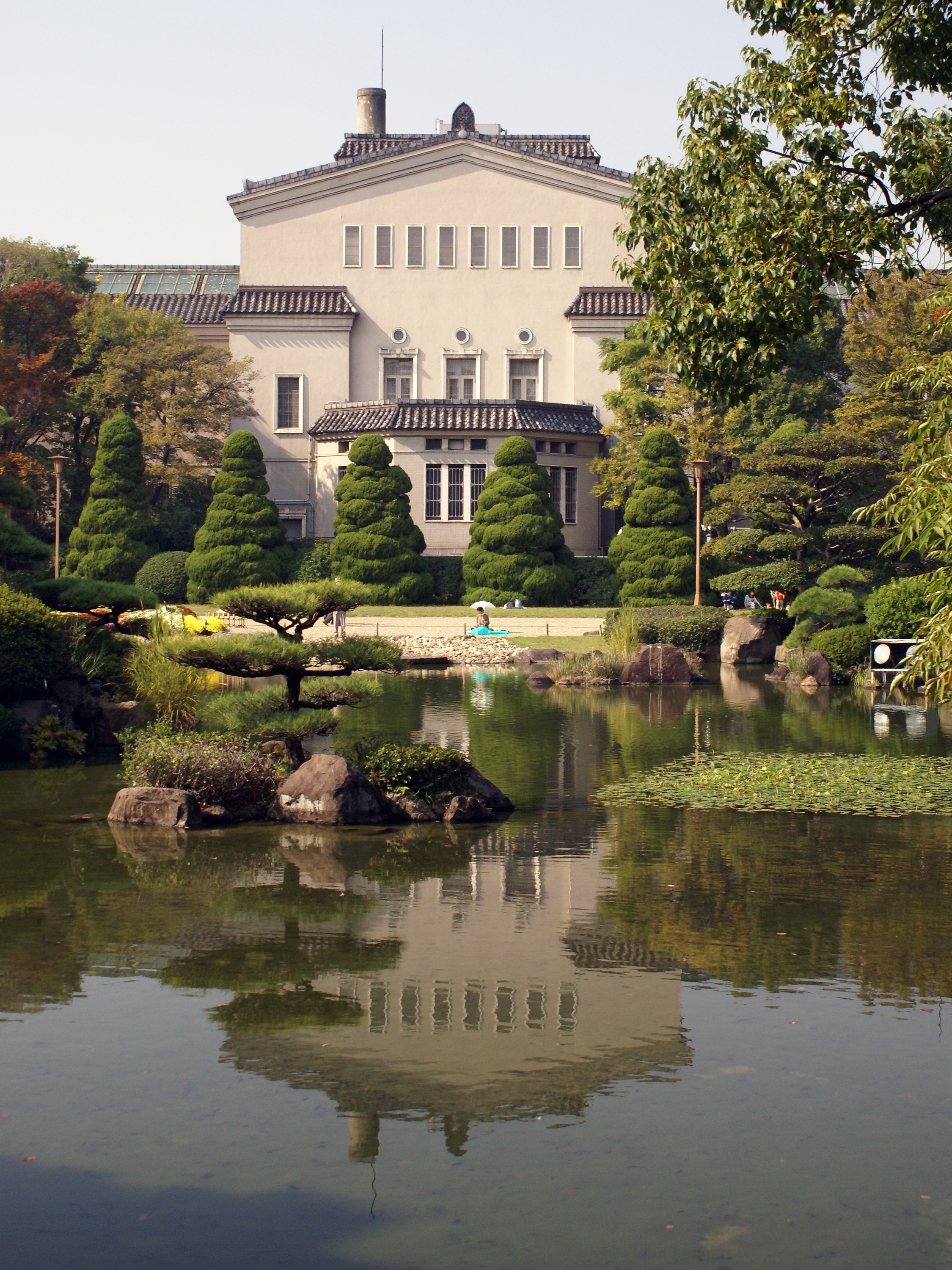 Keitakuen in Osaka, Japan